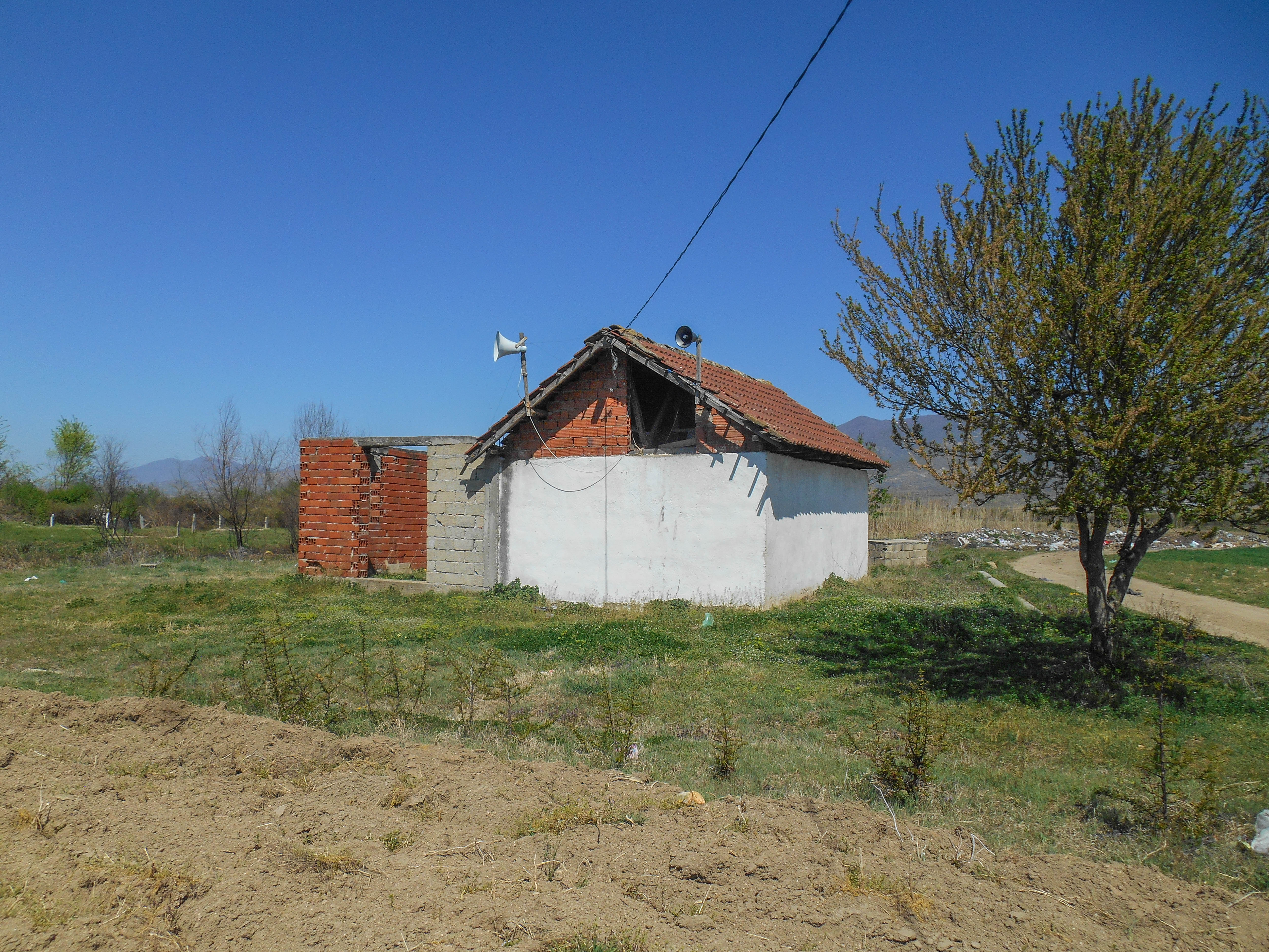 Џамија во Старо Балдовци